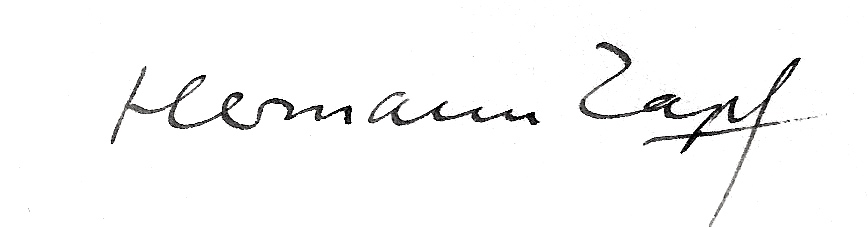 Hermann Zapf. Signatur seines Briefes an mich vom 6.02.1958.